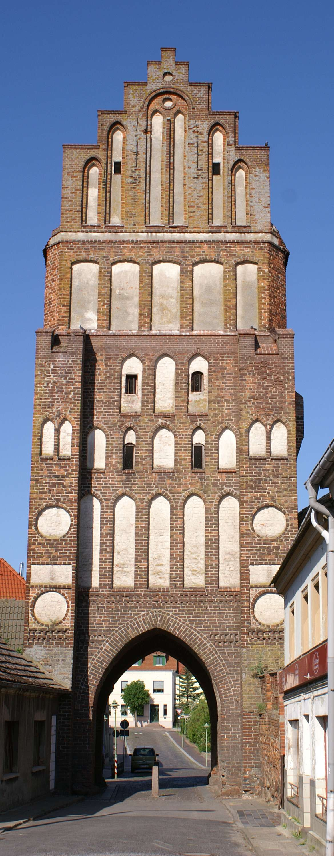 Altentreptow - Landkreis Demmin - Neubrandenburger Tor